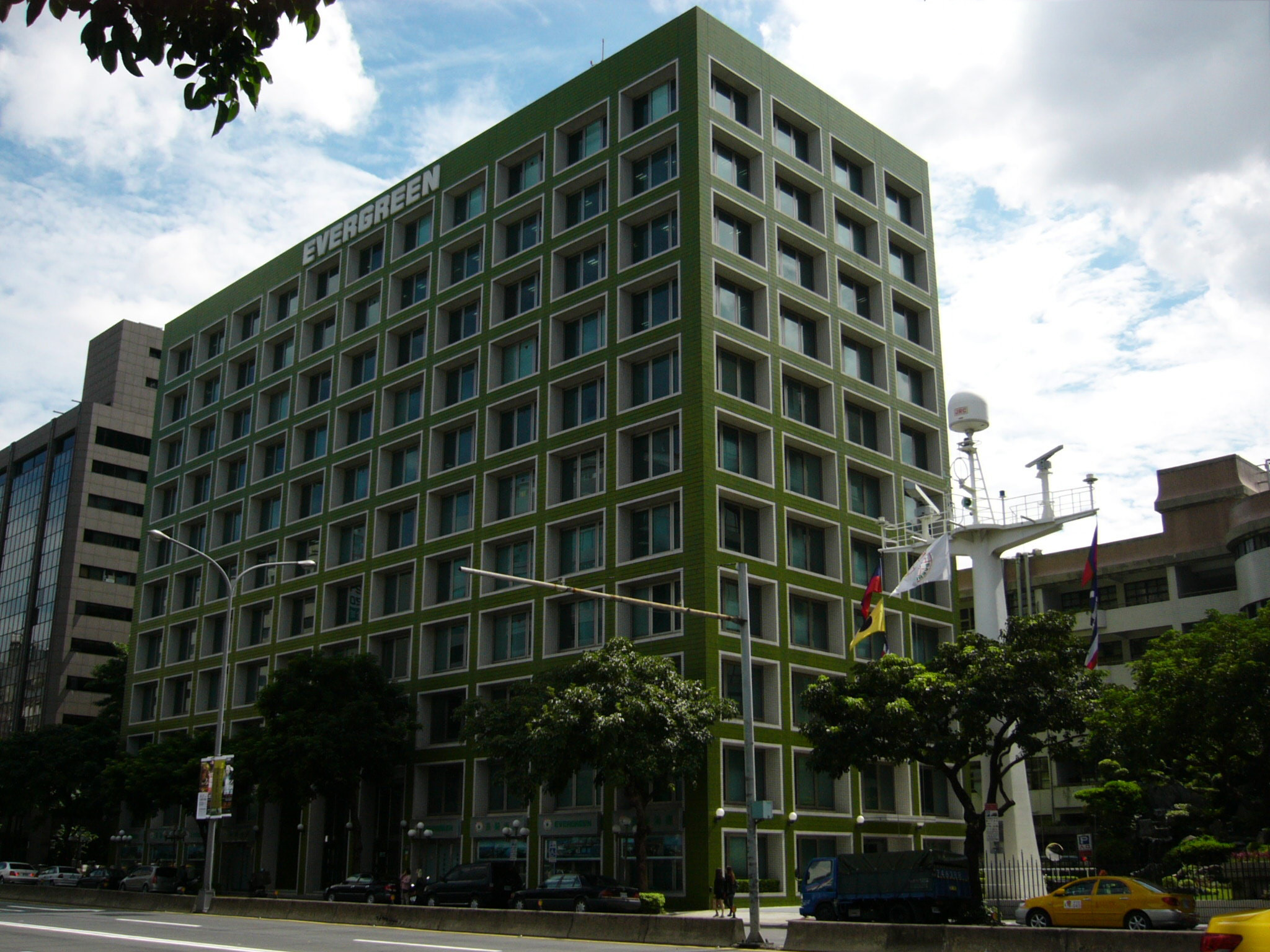 長榮海運大樓，地址：臺北市中山區民生東路二段166號。